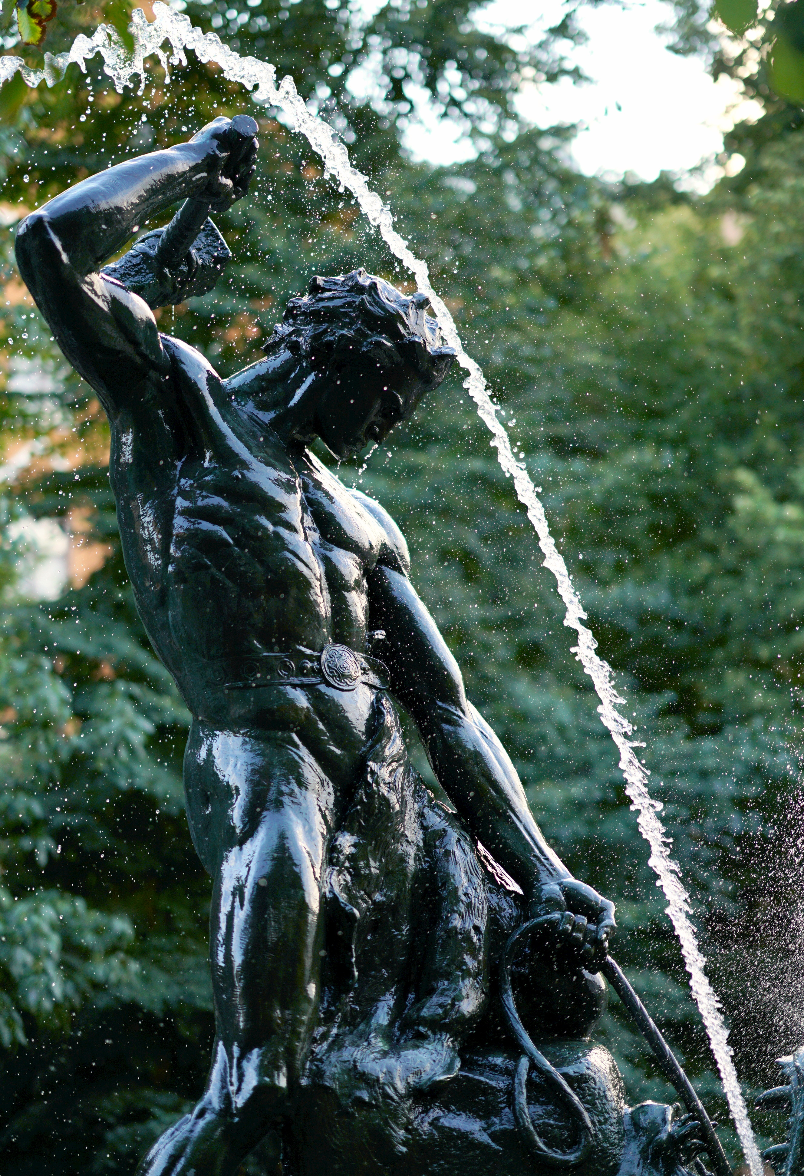 Tors fiske, huvudfigur